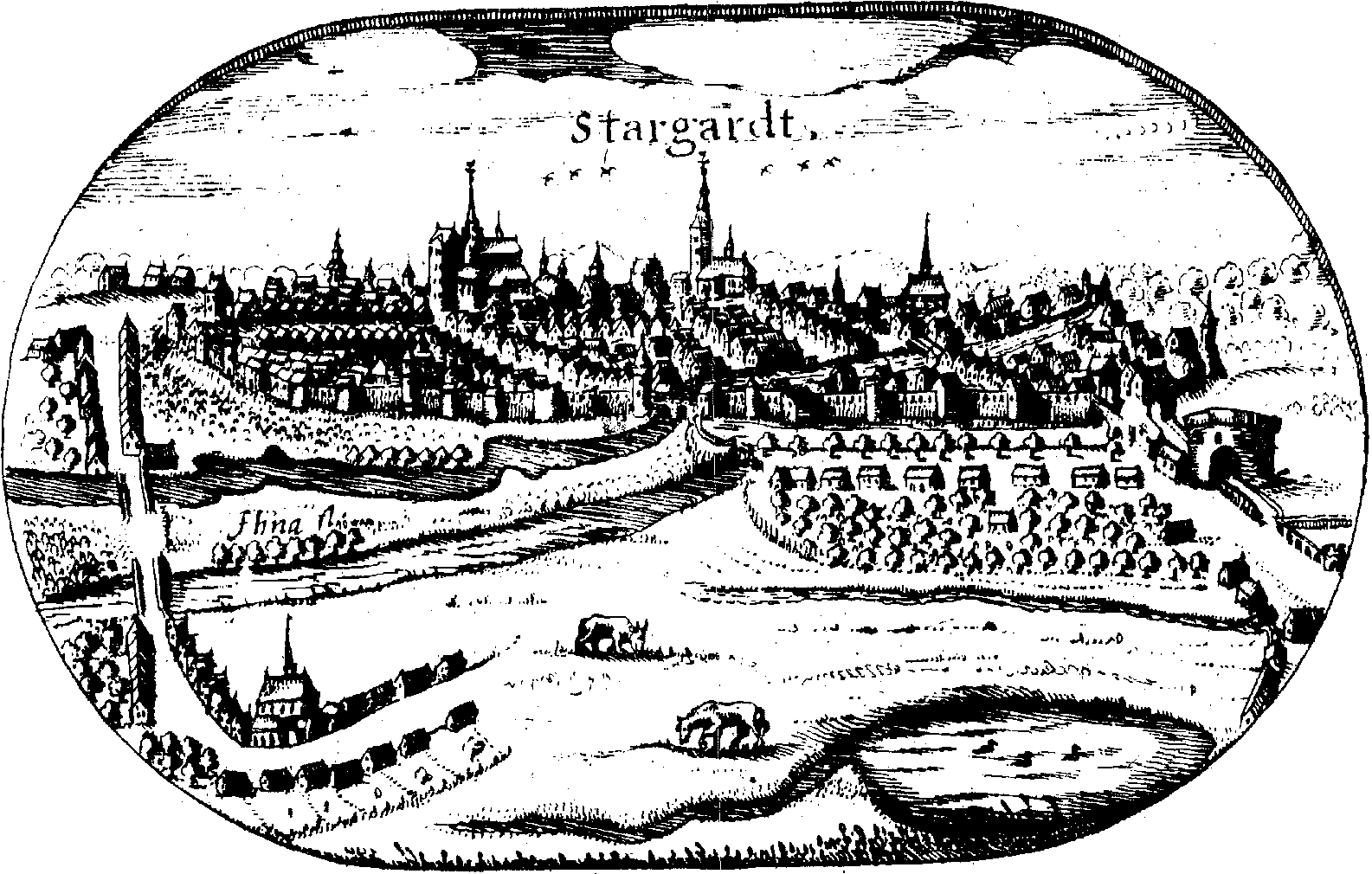 Stargard. Widok ogólny. Wielka Mapa Lubinusa. 1614